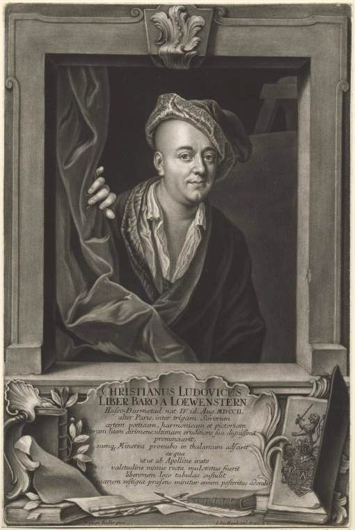 Christian Ludwig Baron (Freiherr) von Löwenstern ((1701 - 1754; oder 1702-1755), Darstellung des Malers und Dichters mit Wappen → bzw. , Sohn des landgräfl. hessen-darmstädt. Geheimen Regierungs- und Konsistorialrats und einer von Remchingen, 1725 hessen-darmstädt. Regierungsassessor, 1727 Hofjunker zu Darmstadt → [1]; fast Halbfigur im Schlafrock mit Mütze, rechts hinter ihm Staffelei, unten lateinische Verse, Schreibfedern, rechts unten Buch, mit seinem Wappen.